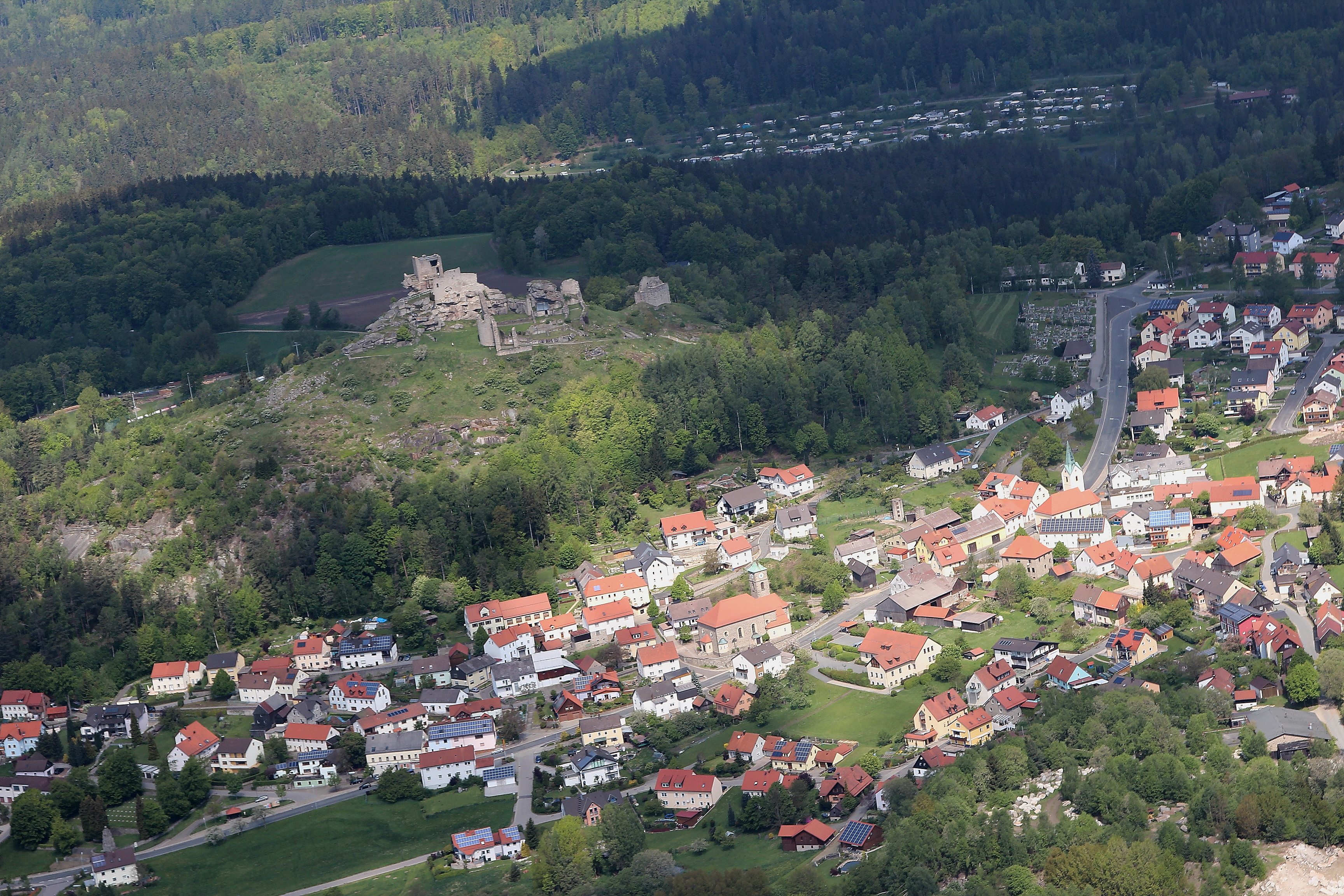 Flossenbürg mit Burgruine, Landkreis Neustadt an der Waldnaab, Oberpfalz, Bayern (2014)